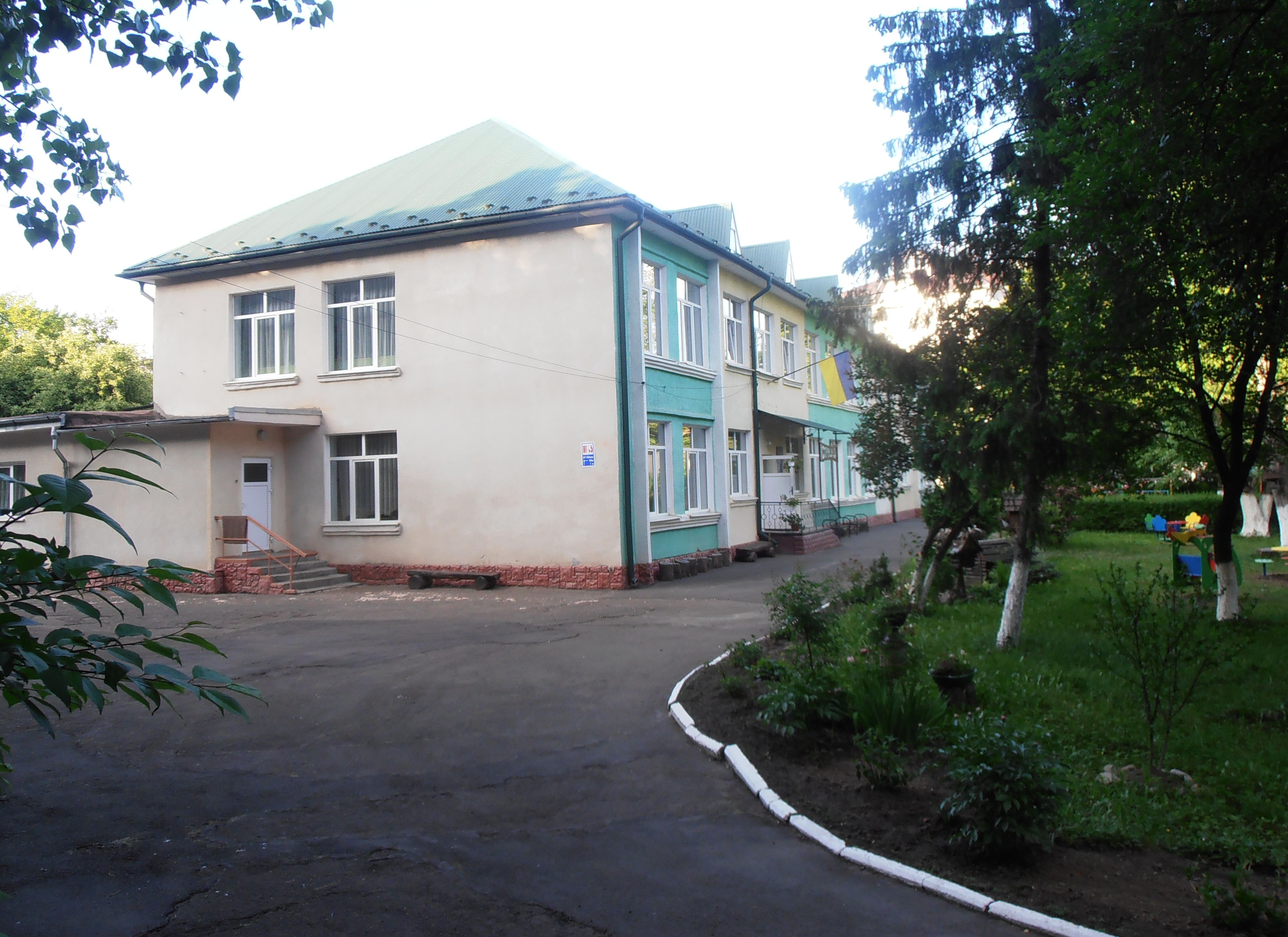 Дитсадок Струмочок